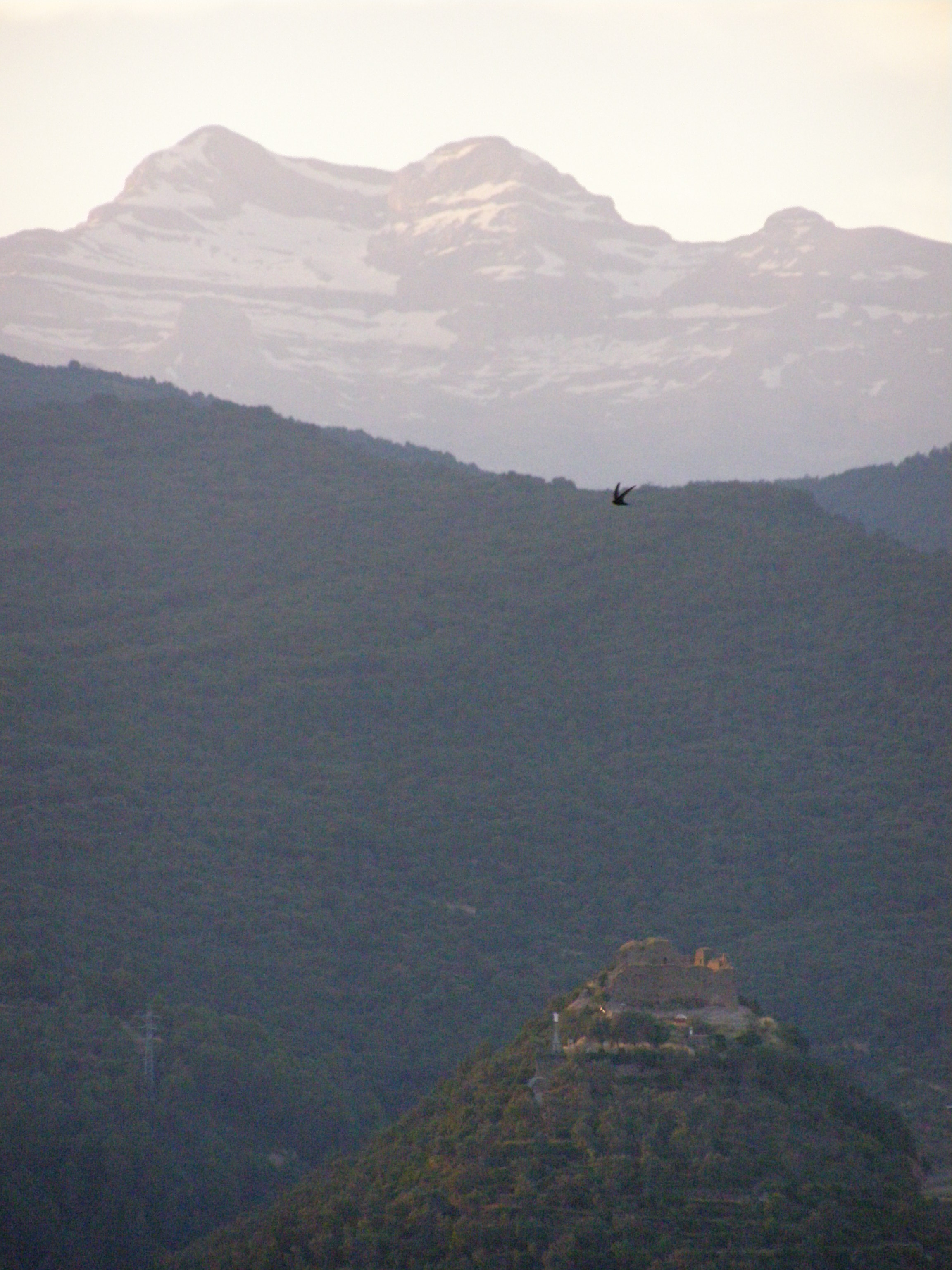 Aragonés: As Tres Serols y o Castiello de Boltanya dende Sieste, en a valle de l'Ara.